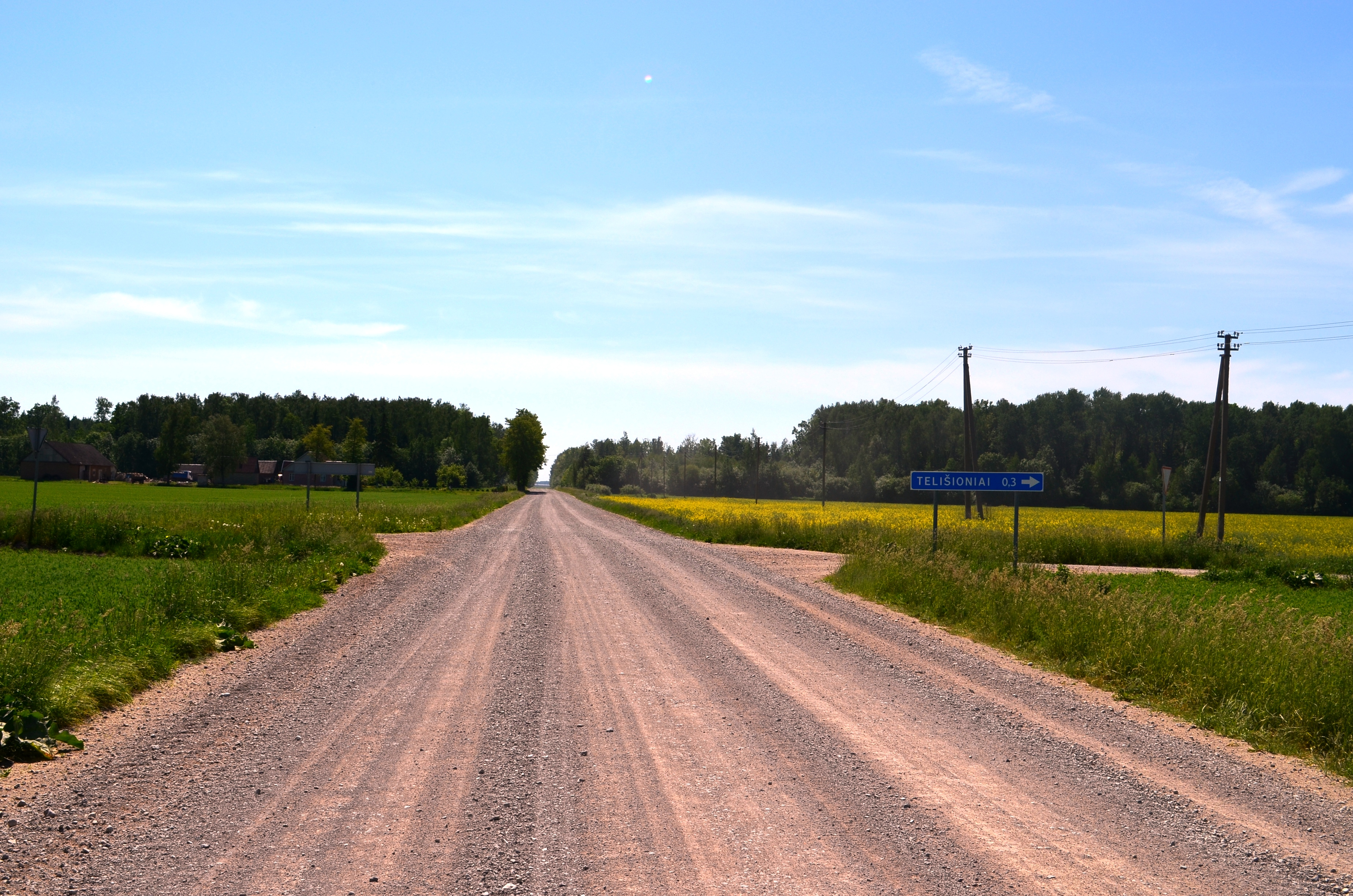 Telišioniai, Pakruojo raj.